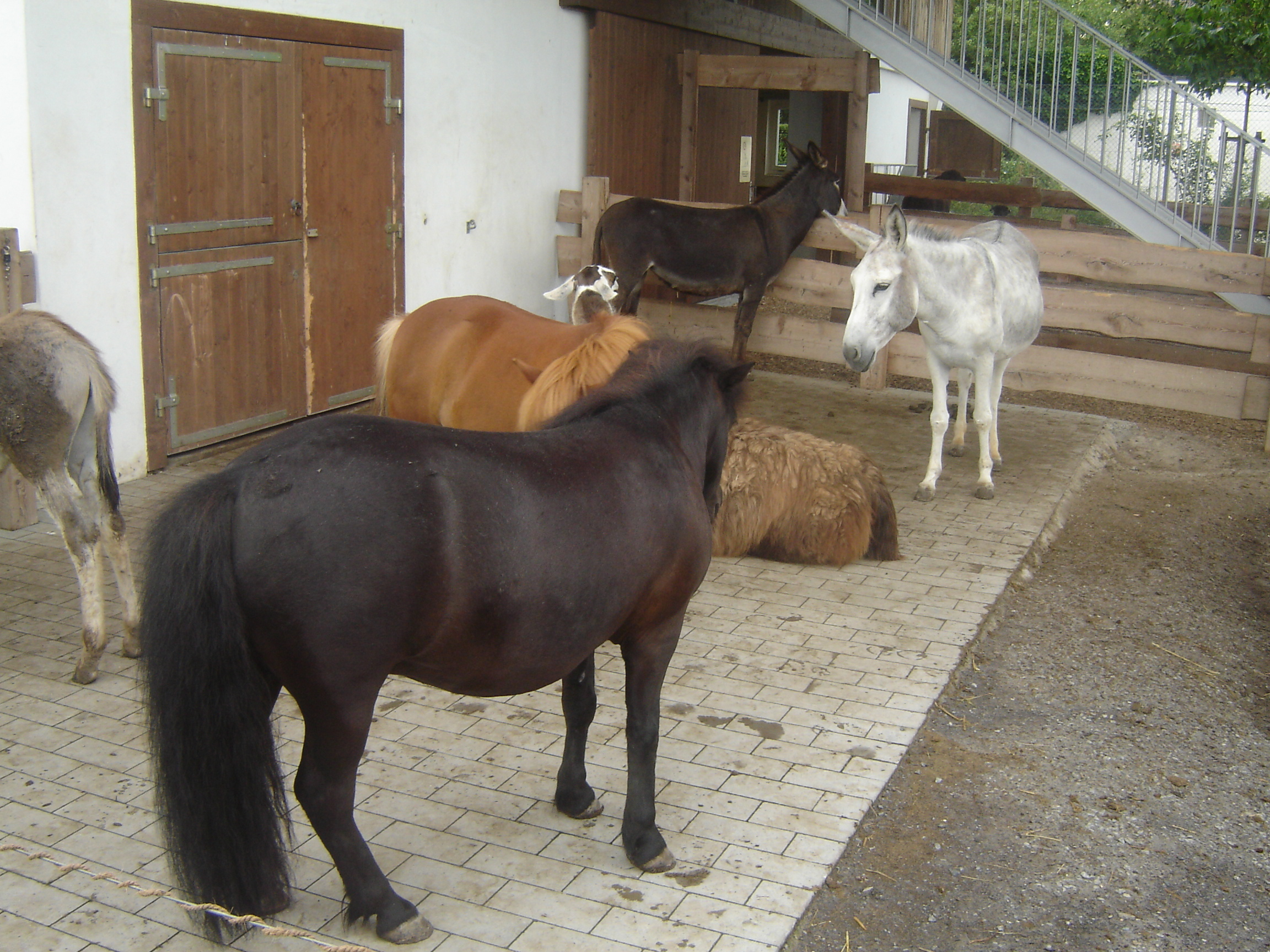 Pferde, hinten Esel im Zoolino